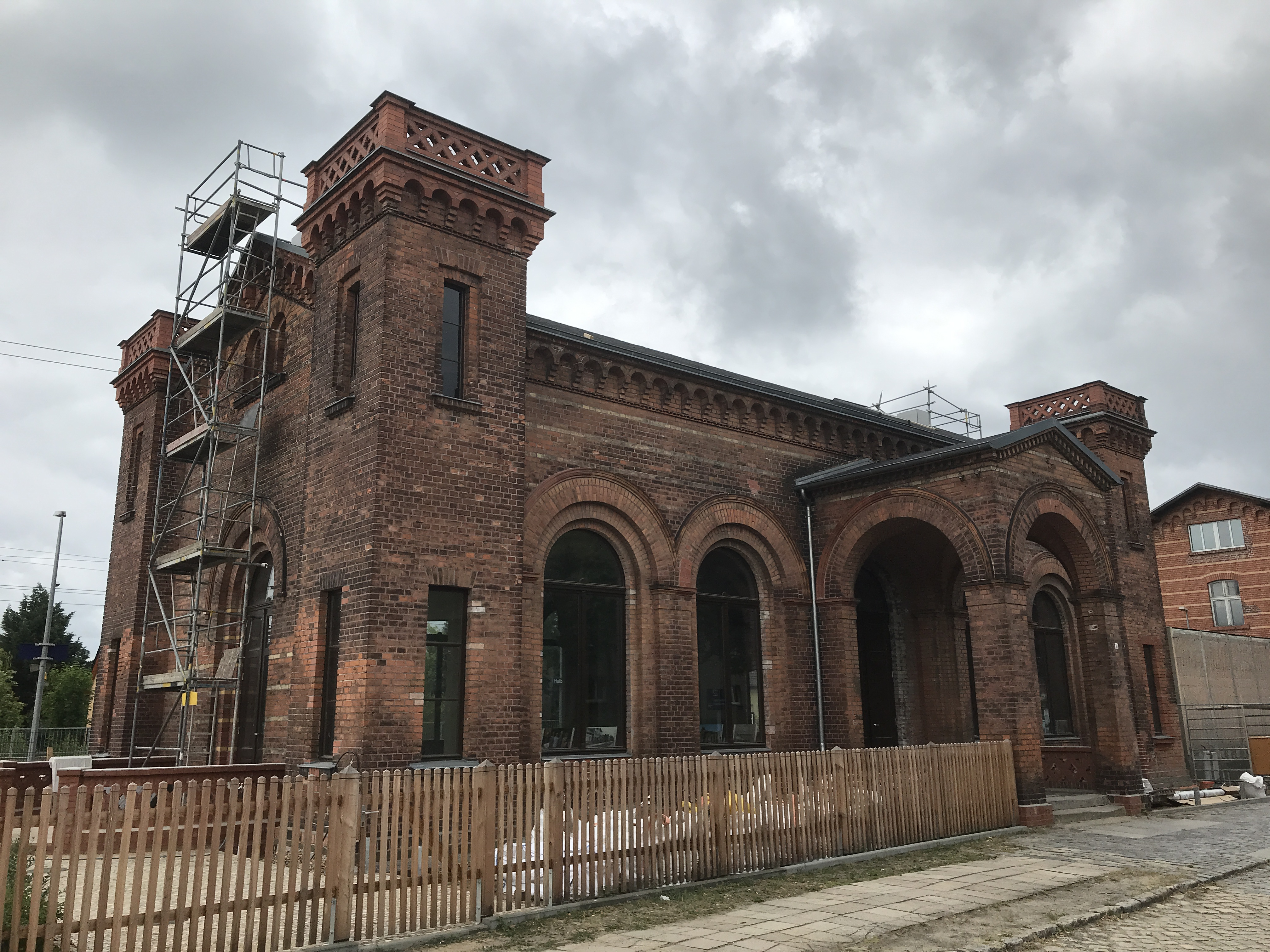 Denkmalgeschützter Bahnhof von Halbe, Brandenburg